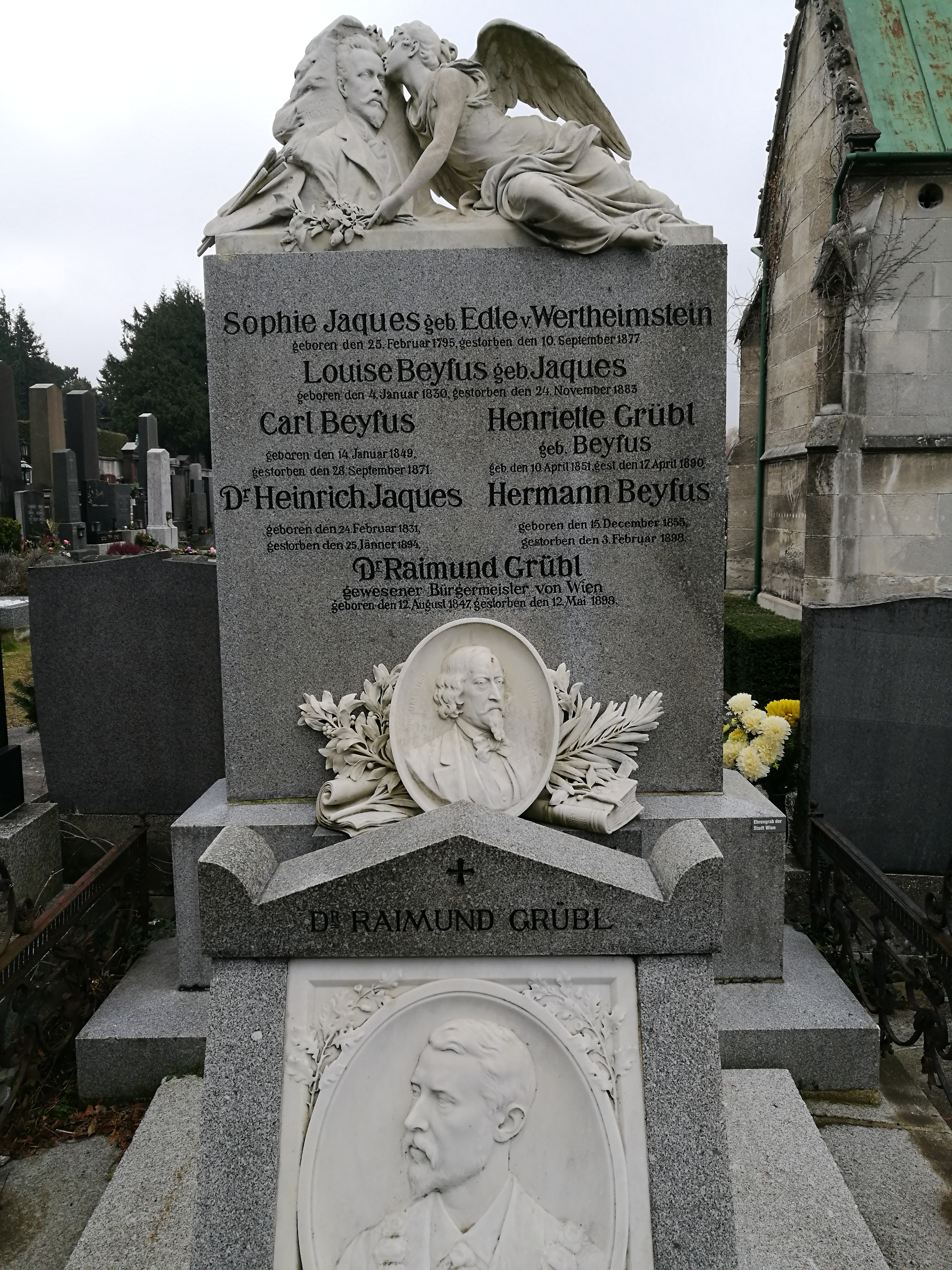 Grab von Raimund Grübl, Heinrich Jaques und Hermann Beyfuss am Hietzinger Friedhof in Wien. Die Porträtreliefs wurden von Johannes Benk angefertigt. Quelle